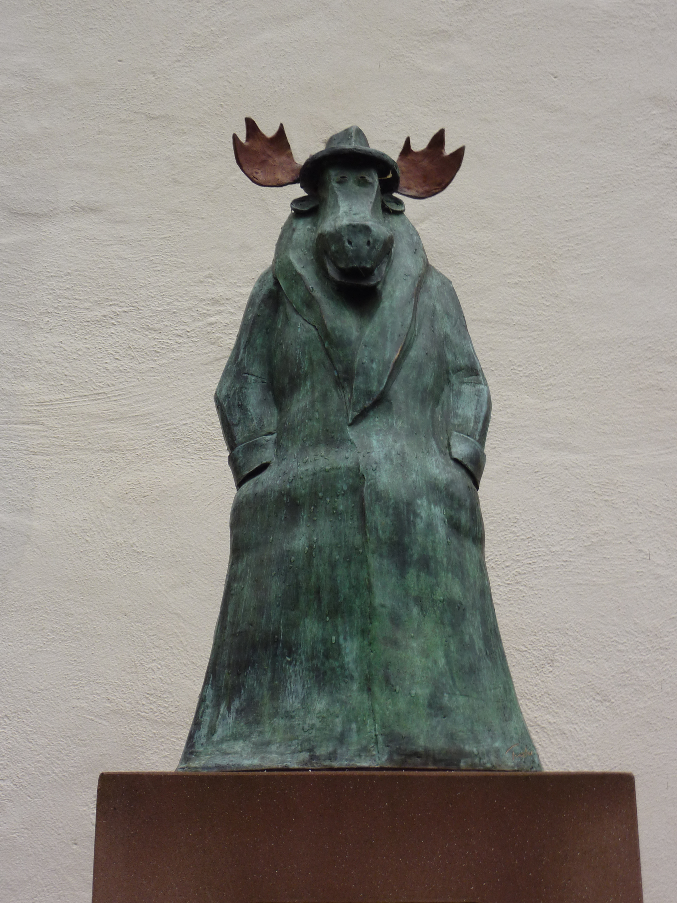 перед музеем карикатуры